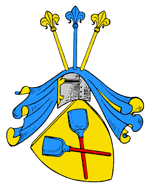 Wappen der Familie von Boeselager.